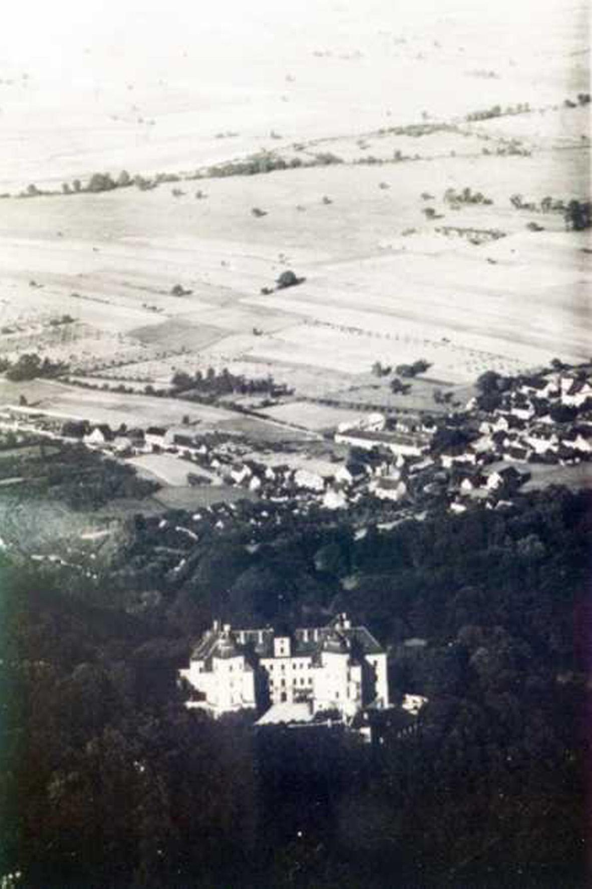 Schloss Jezeří (Eisenberg) mit der Gemeinde Albrechtice (Ulbersdorf).